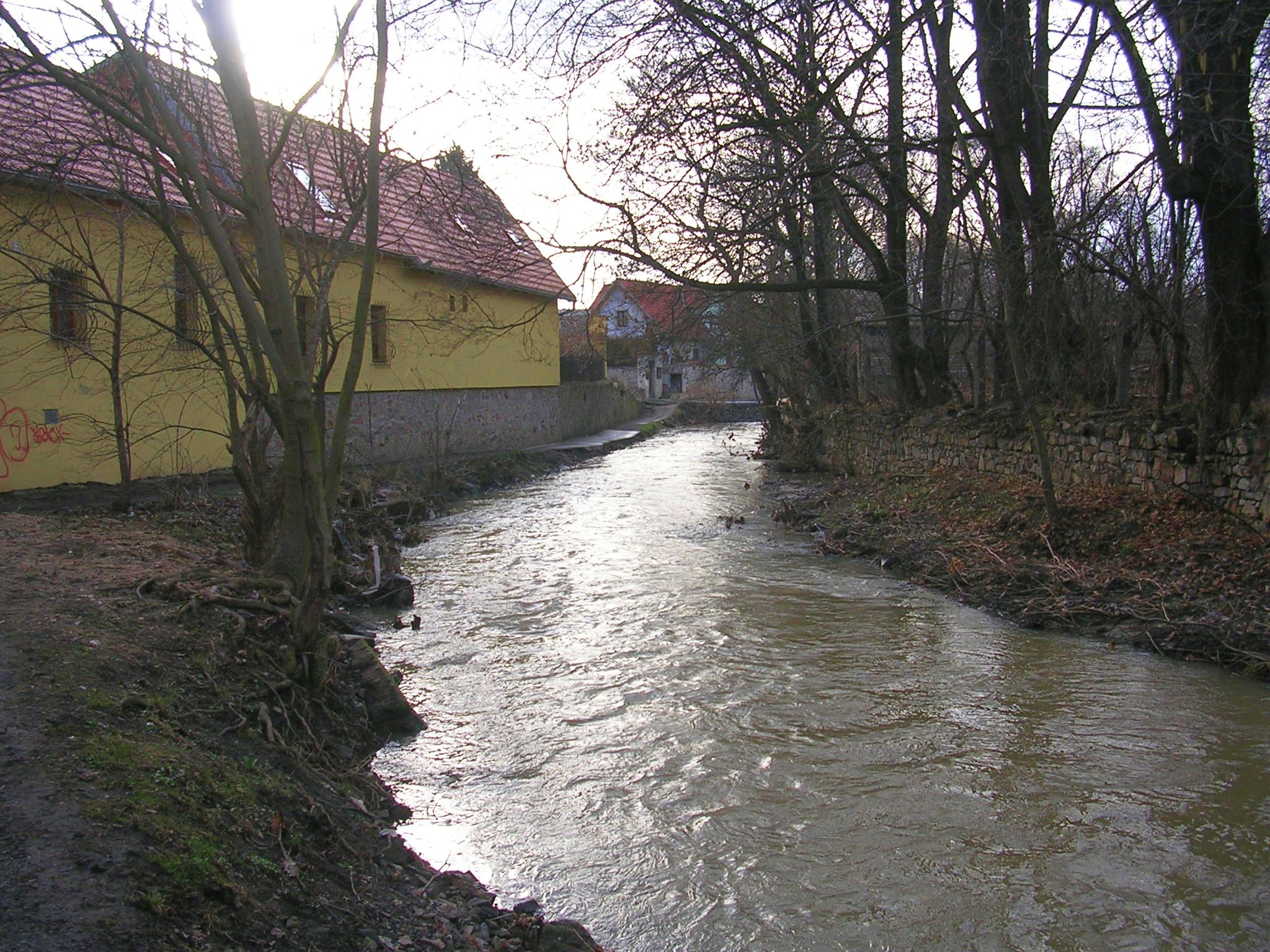 Botič v Hostivaři pod ulicí Domkářskou.